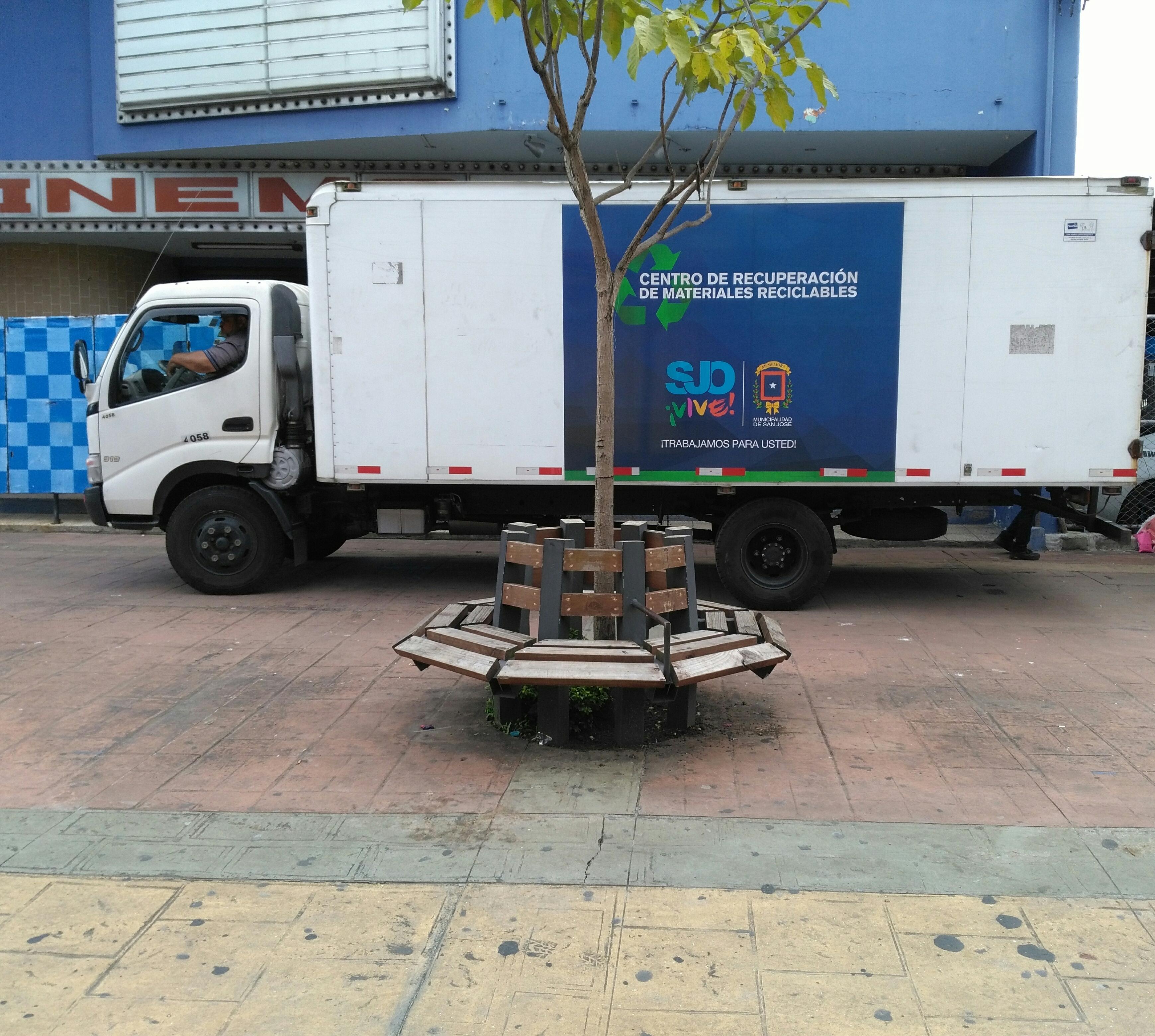 Camión de recolección de reciclaje en San José